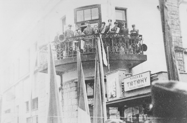 Генерал-чотар УГА, член військової референтури Проводу українських націоналістів В.Курманович на балконі будівлі Головної Команди під час проведення ІІ краєвого з’їзду Карпатської Січі в Хусті 19 лютого 1939 р.